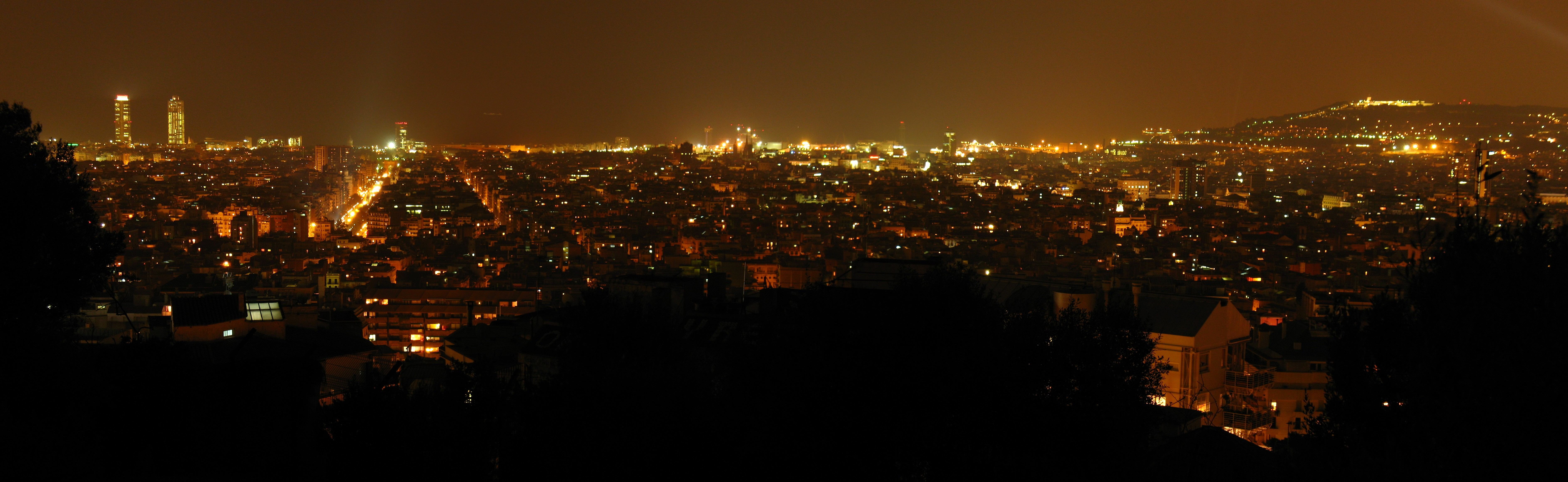 Panorámica nocturna de Barcelona tomada desde el parque Güell.